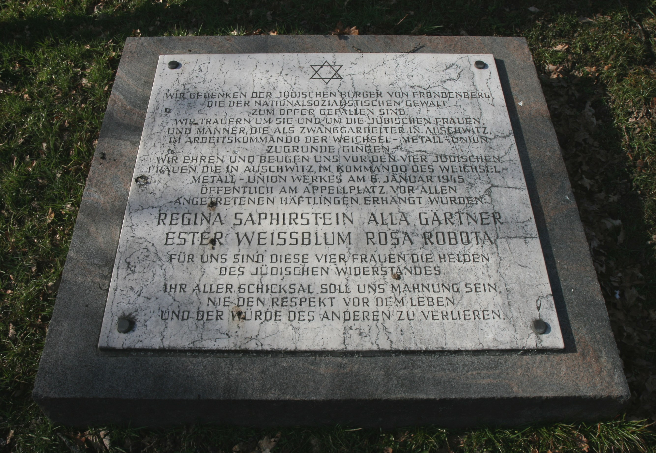 Jüdischer Friedhof in Fröndenberg/Ruhr, Springstraße.